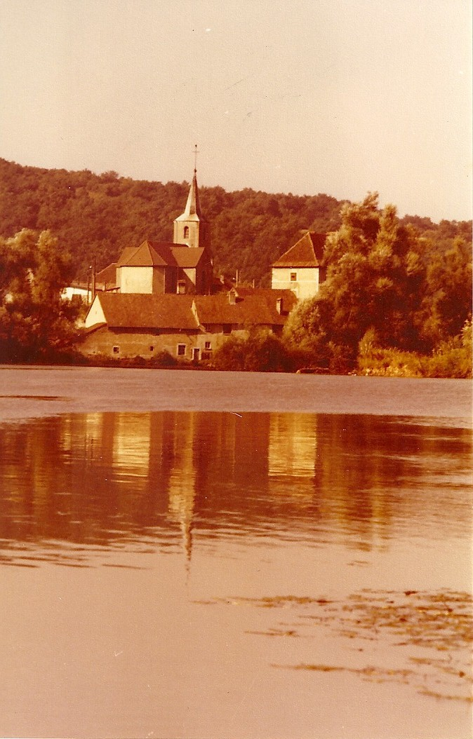 Vue de l'église et du château depuis la rive du Doubs